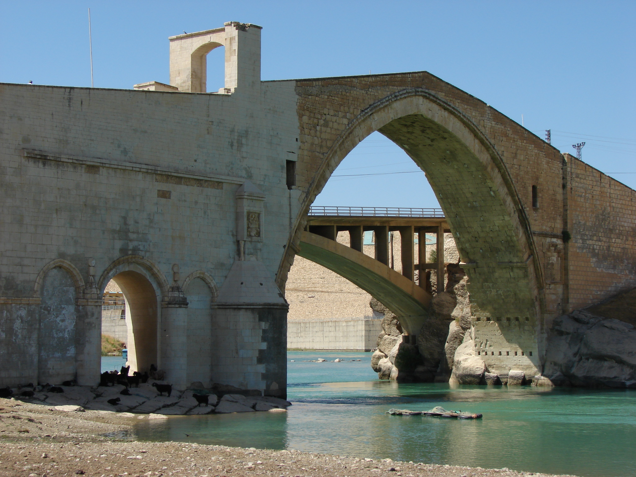 Kurdî: Pireya Malabadê...